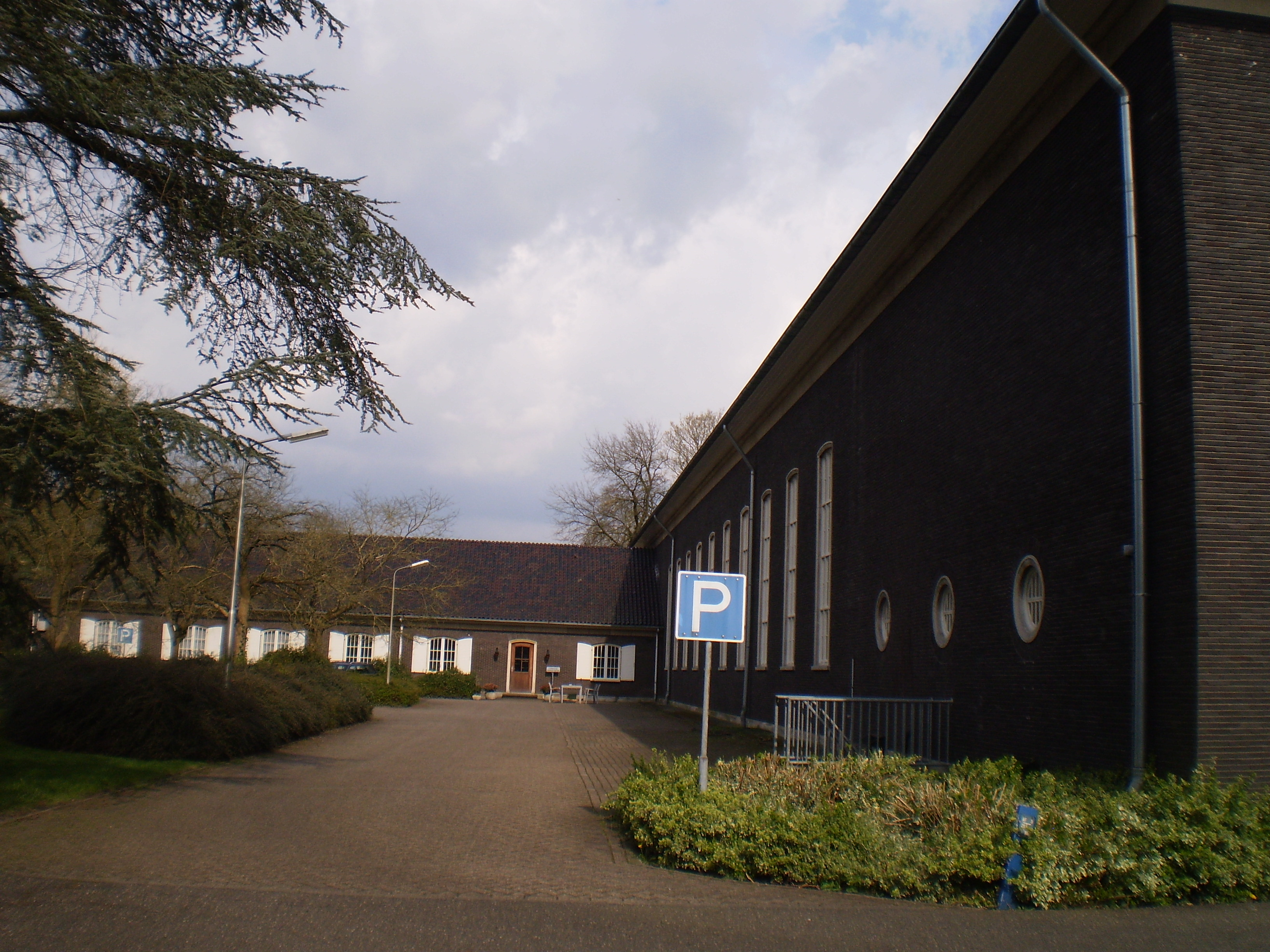 Officierscasino